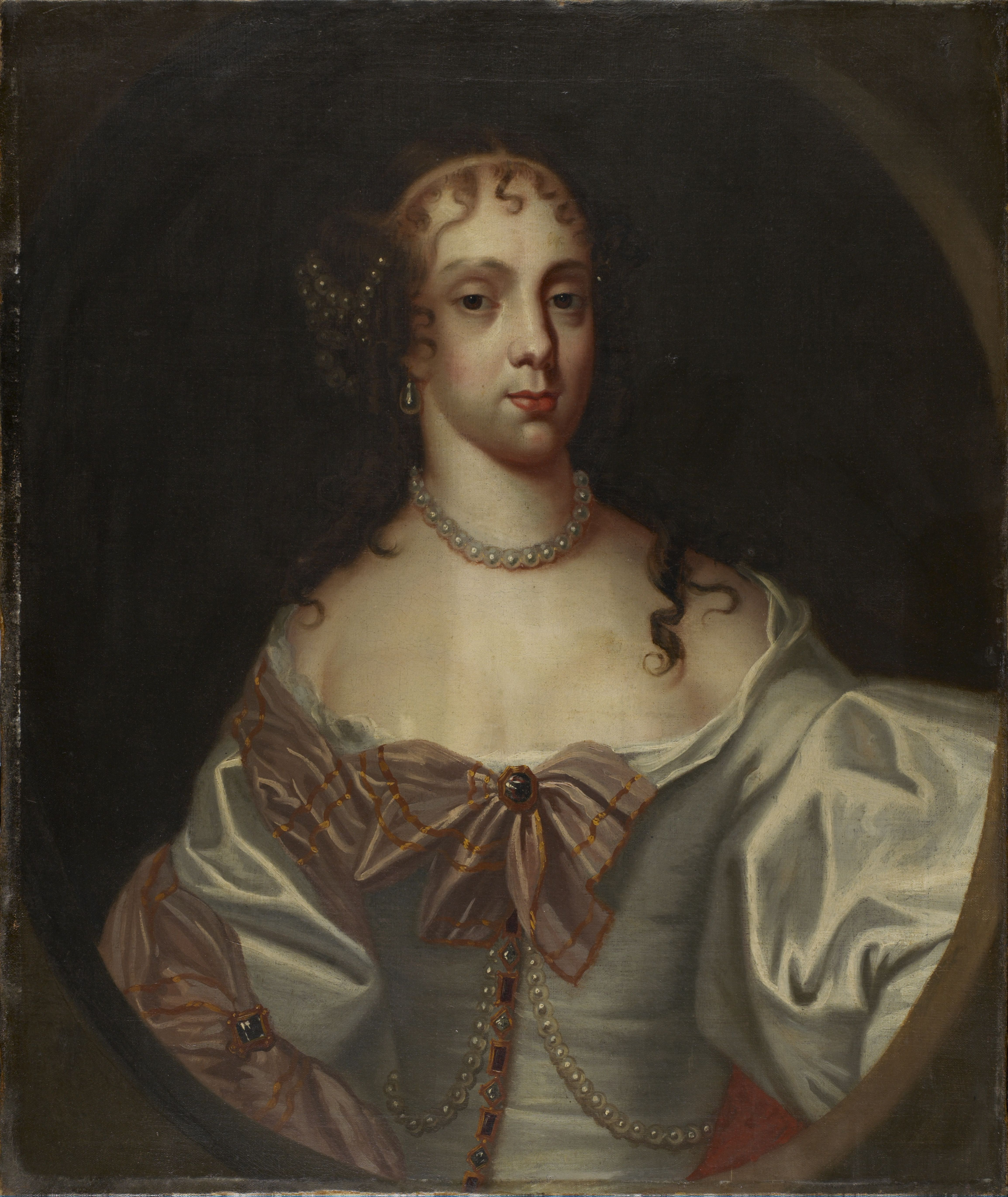 Caterina di Braganza (1638-1705) regina d'Inghilterra e moglie di Carlo II